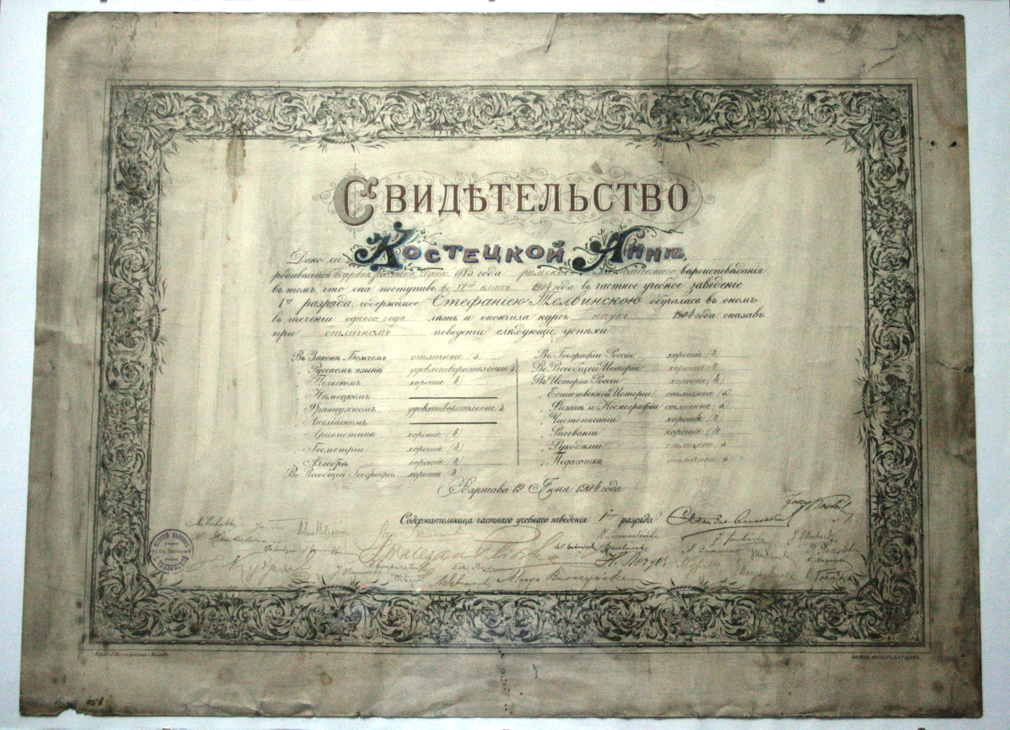 Świadectwo maturalne Anny Podgórskiej z 1904 roku z gimnazjum Stefanii Tołwińskiej w Warszawie